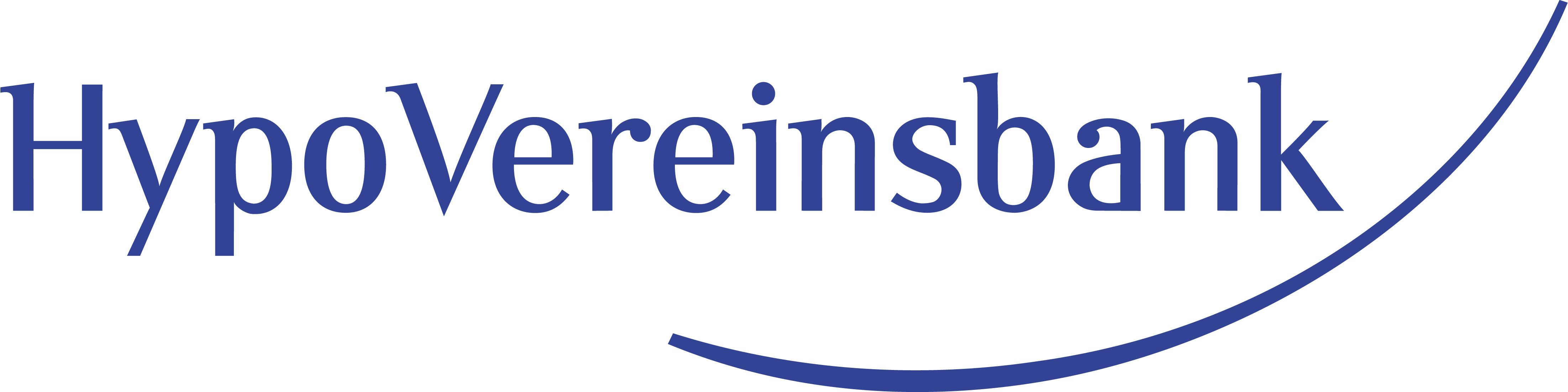 Logo of Bayerische Hypo- und Vereinsbank until 31 March 2008.